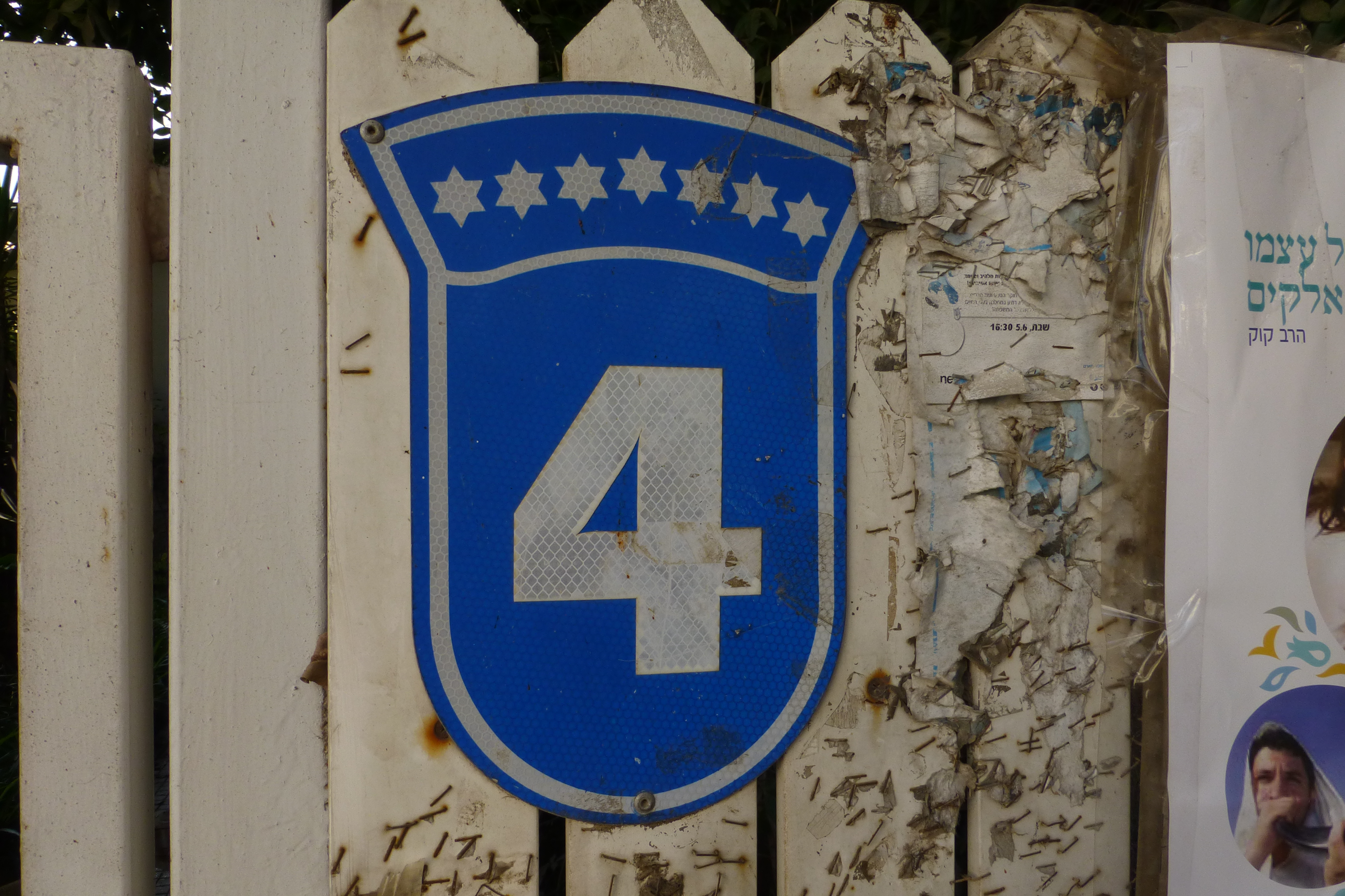 רח' בני בנימין 4, הרצליה